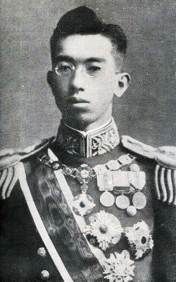 see picture